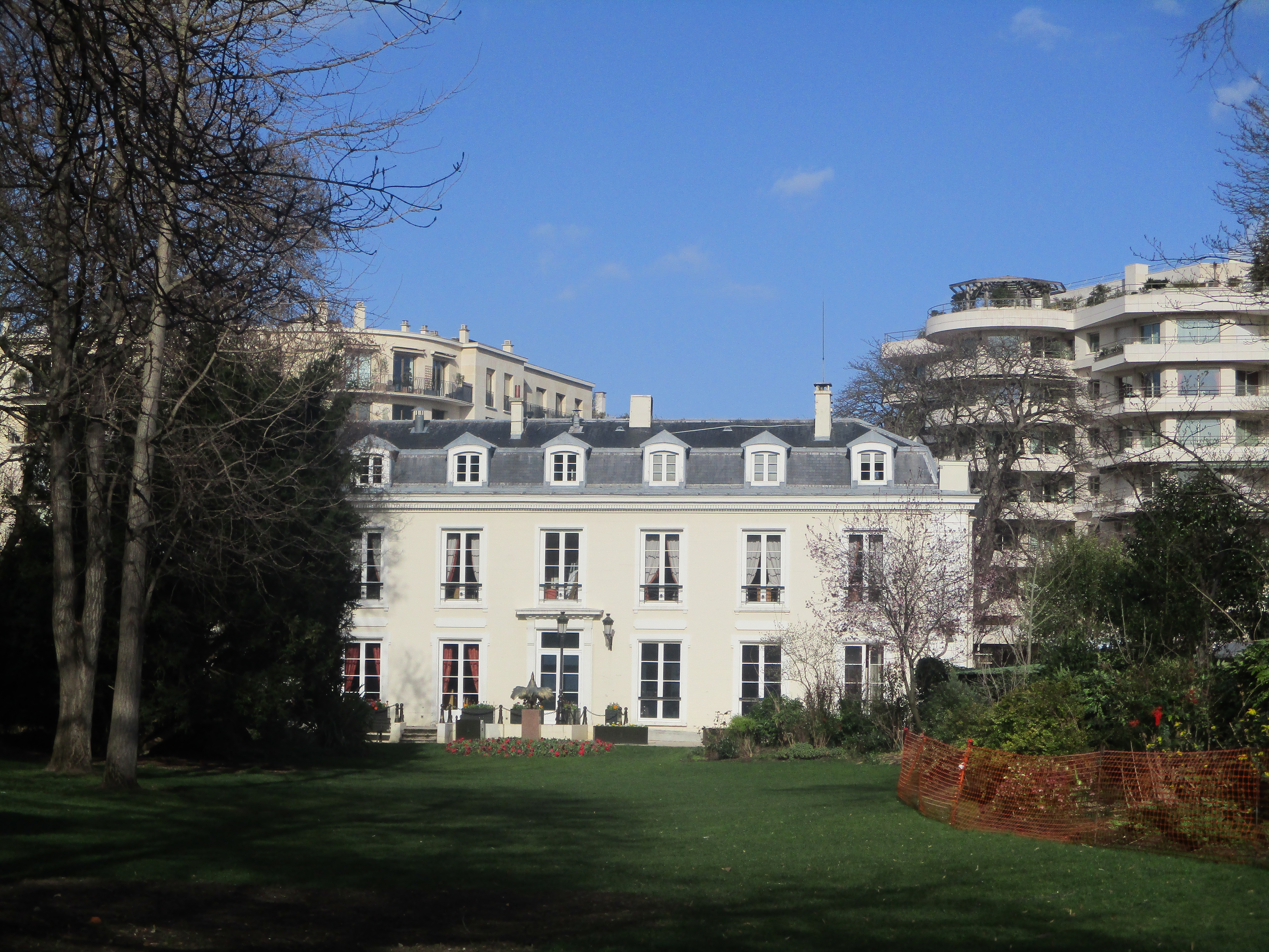 Château de la Planchette à Levallois-Perret, ancienne demeure du comte Béranger.